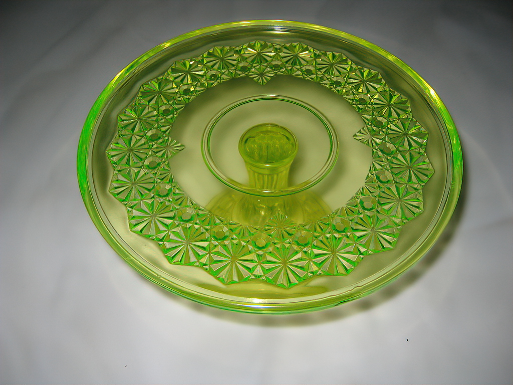 A picture of a Uranium Glass Cakeplate